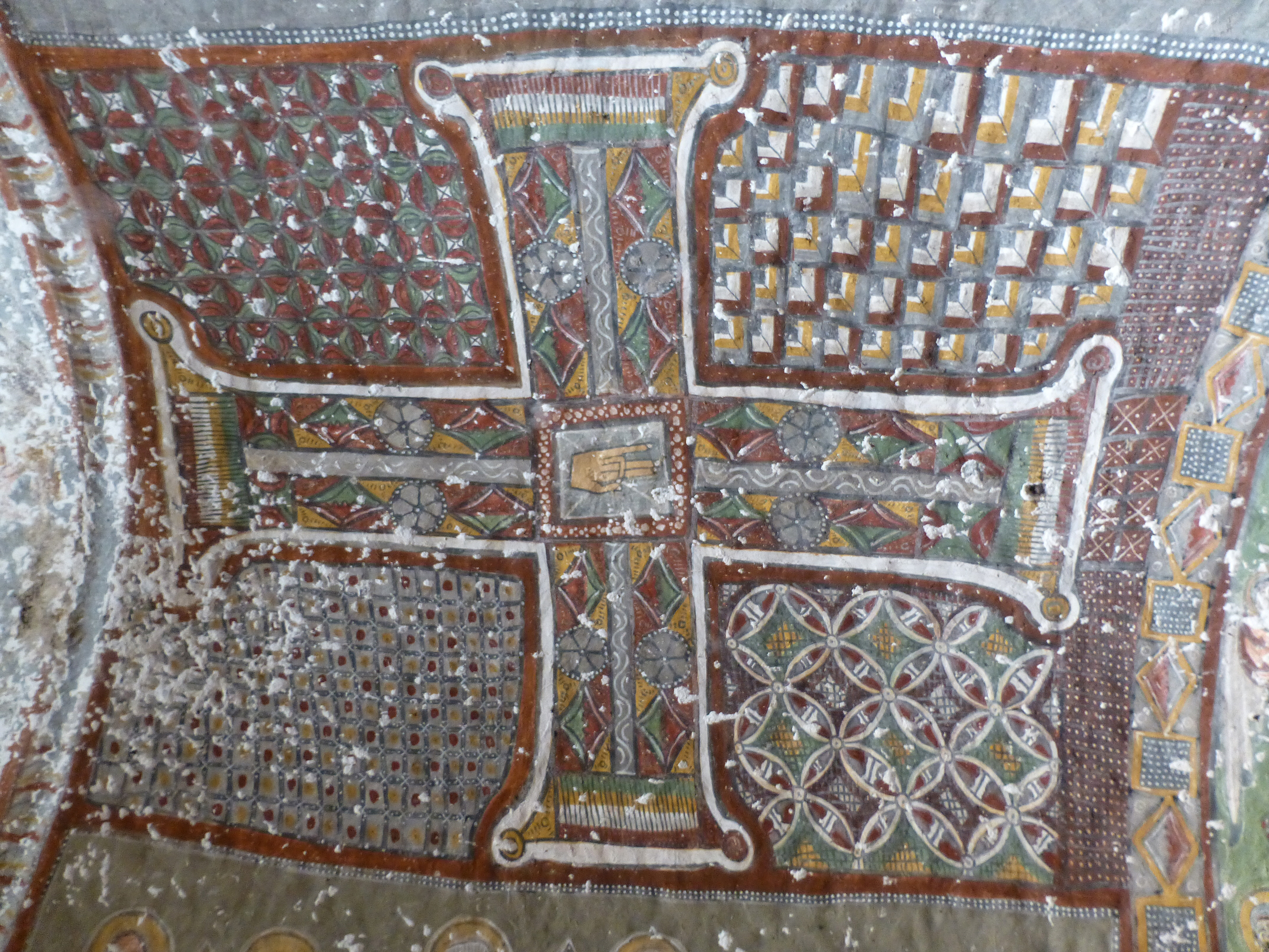 Kokar Kilise (l'église odorante), dans la vallée d'Ihlara (Cappadoce, Turquie)